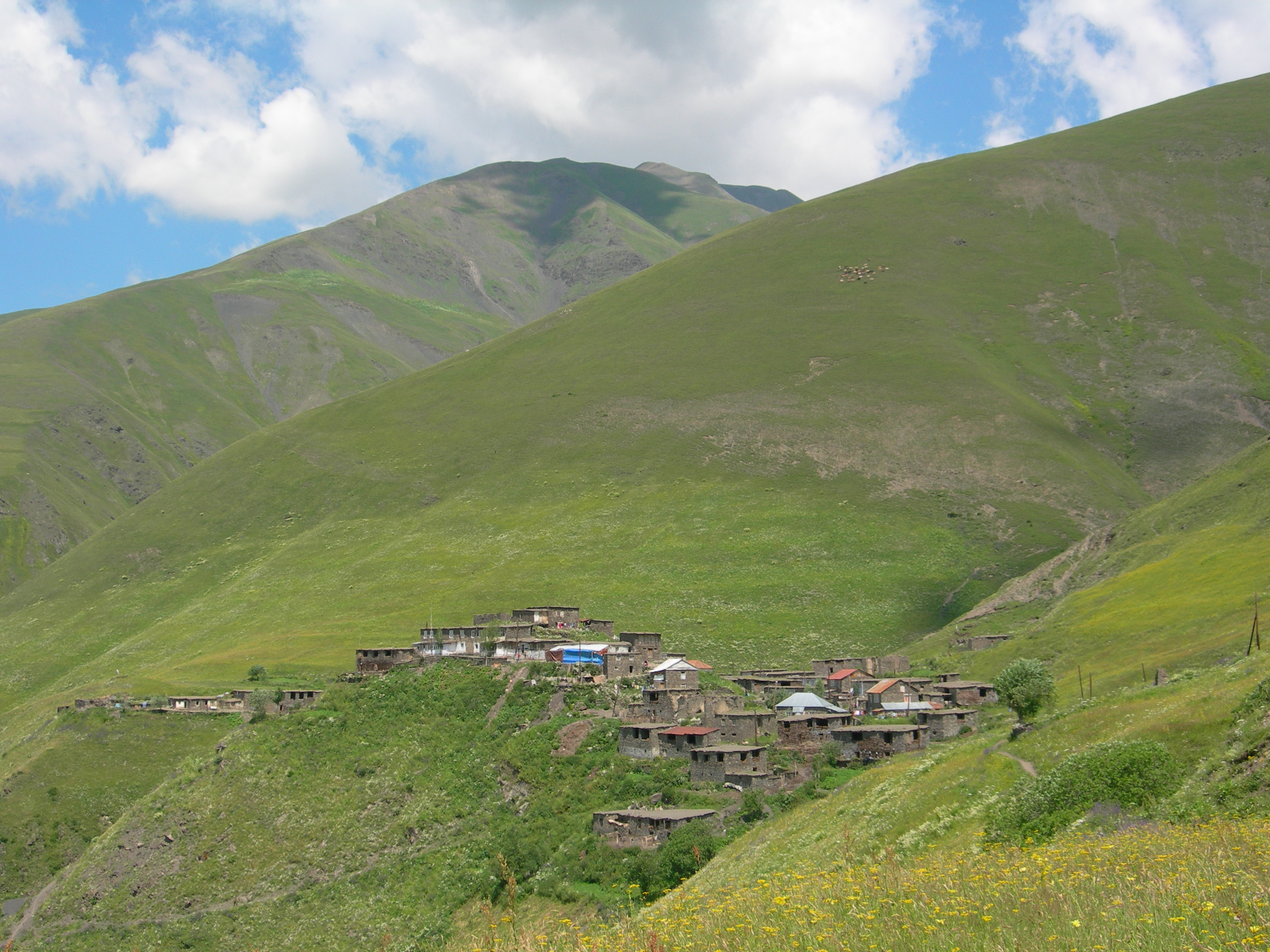 Селение Кусур Рутульского района